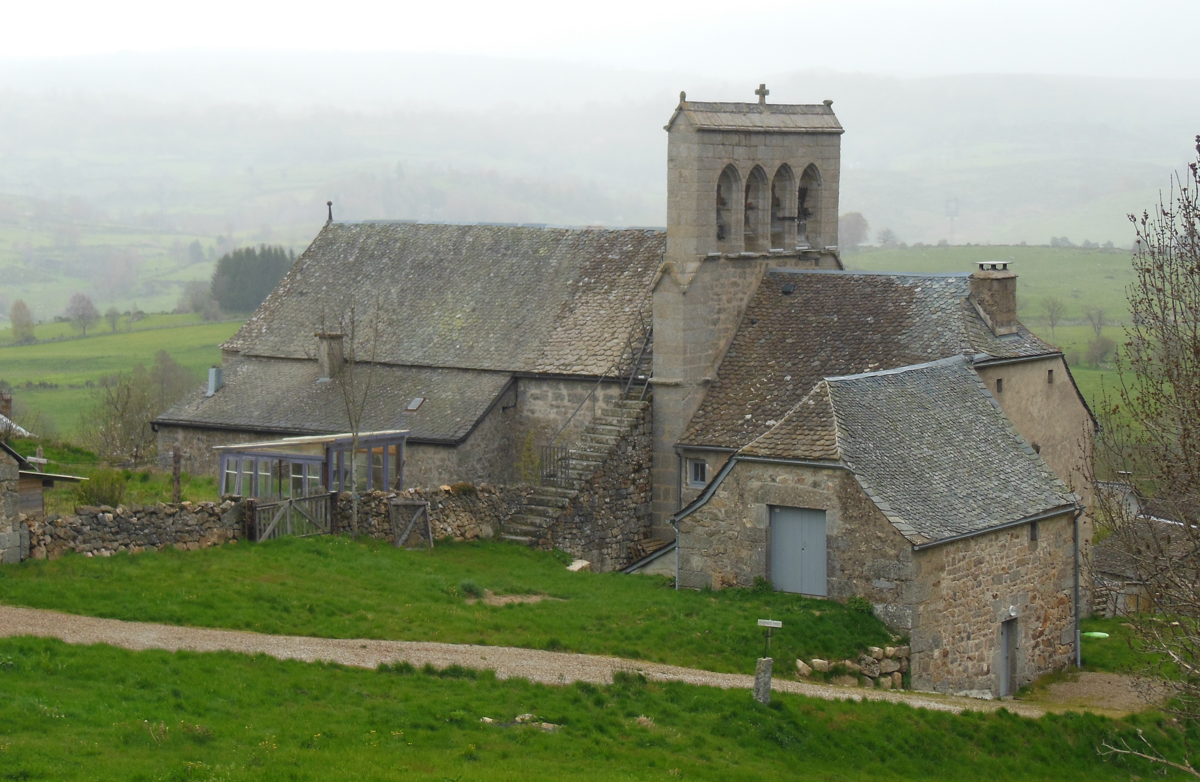 Église Saint-Rémi de Saint-Rémy-de-Chaudes-Aigues (Cantal, France)